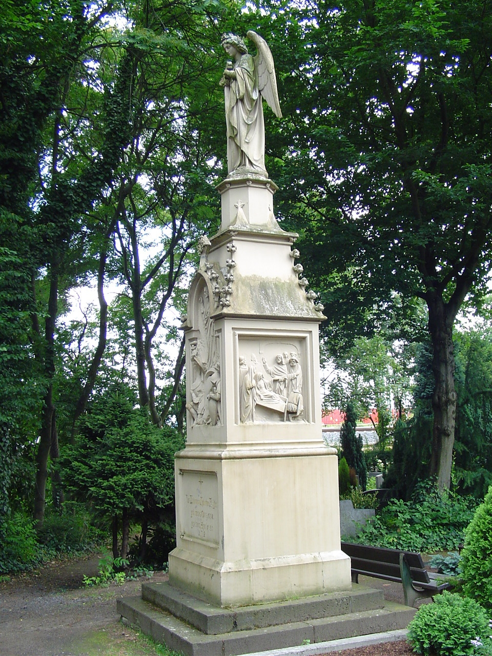 Katholischer Friedhof Köln-Mülheim